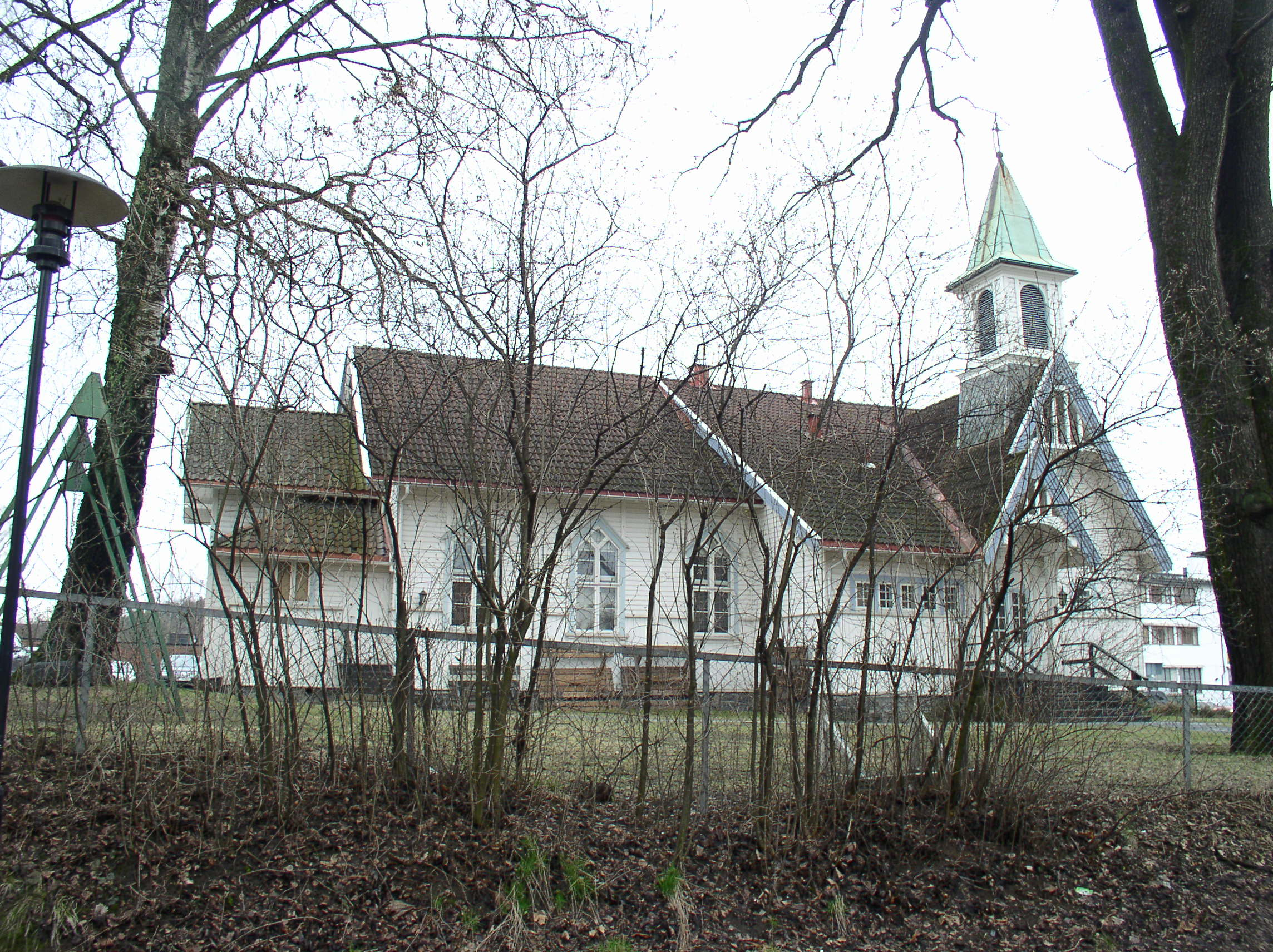 Pinsekirken i Bærum